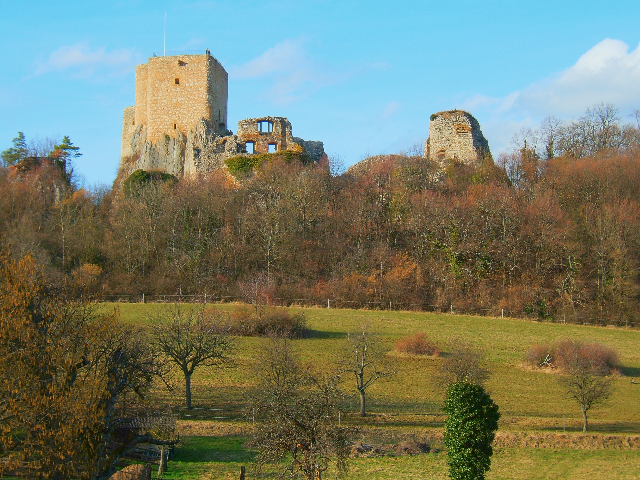 Ruins of Castle Landskron (Chateau du Landskron, Burg Landskron), Leymen, Alsace, France